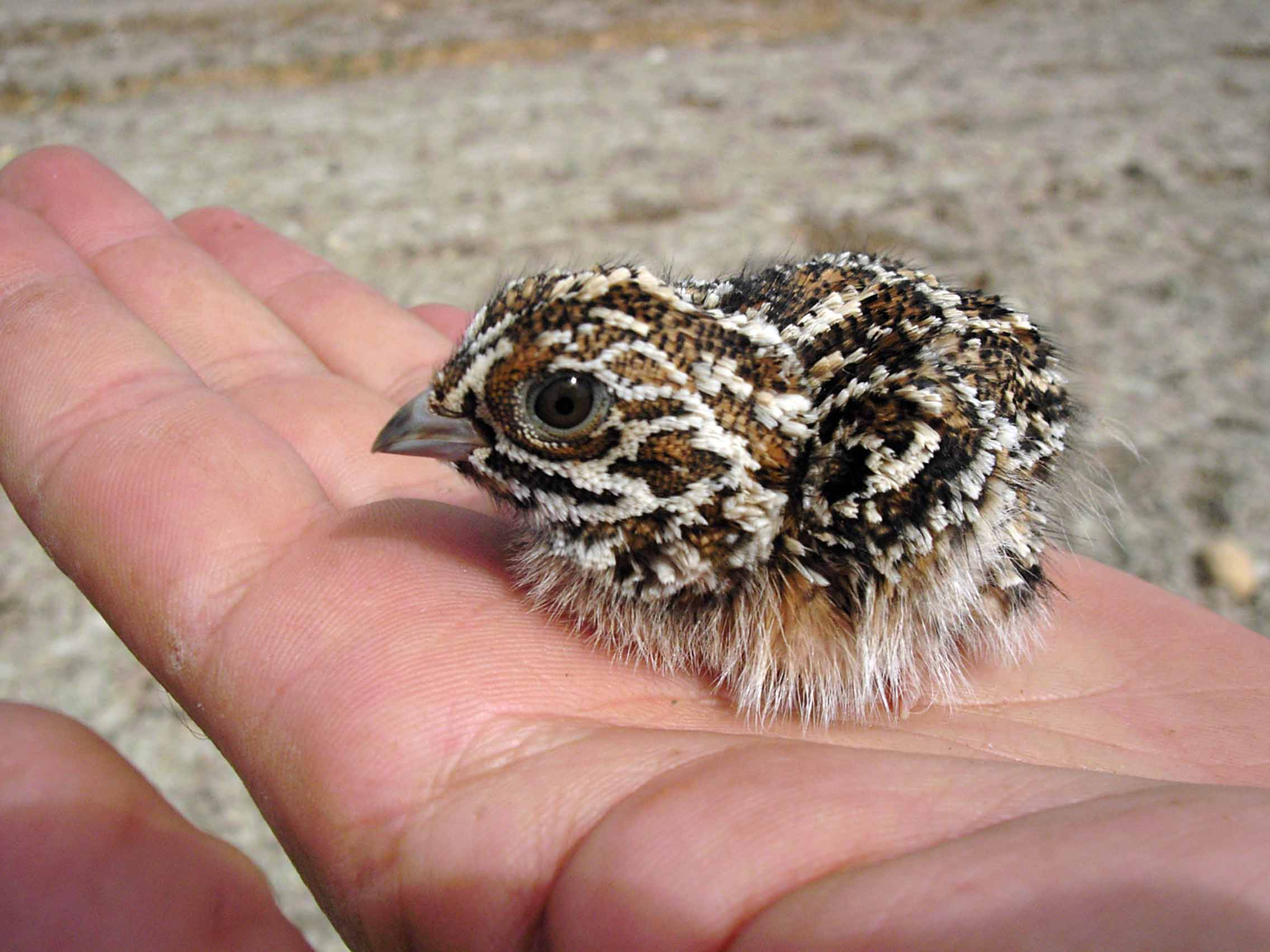 Polo de ganga ibérica sobre una mano